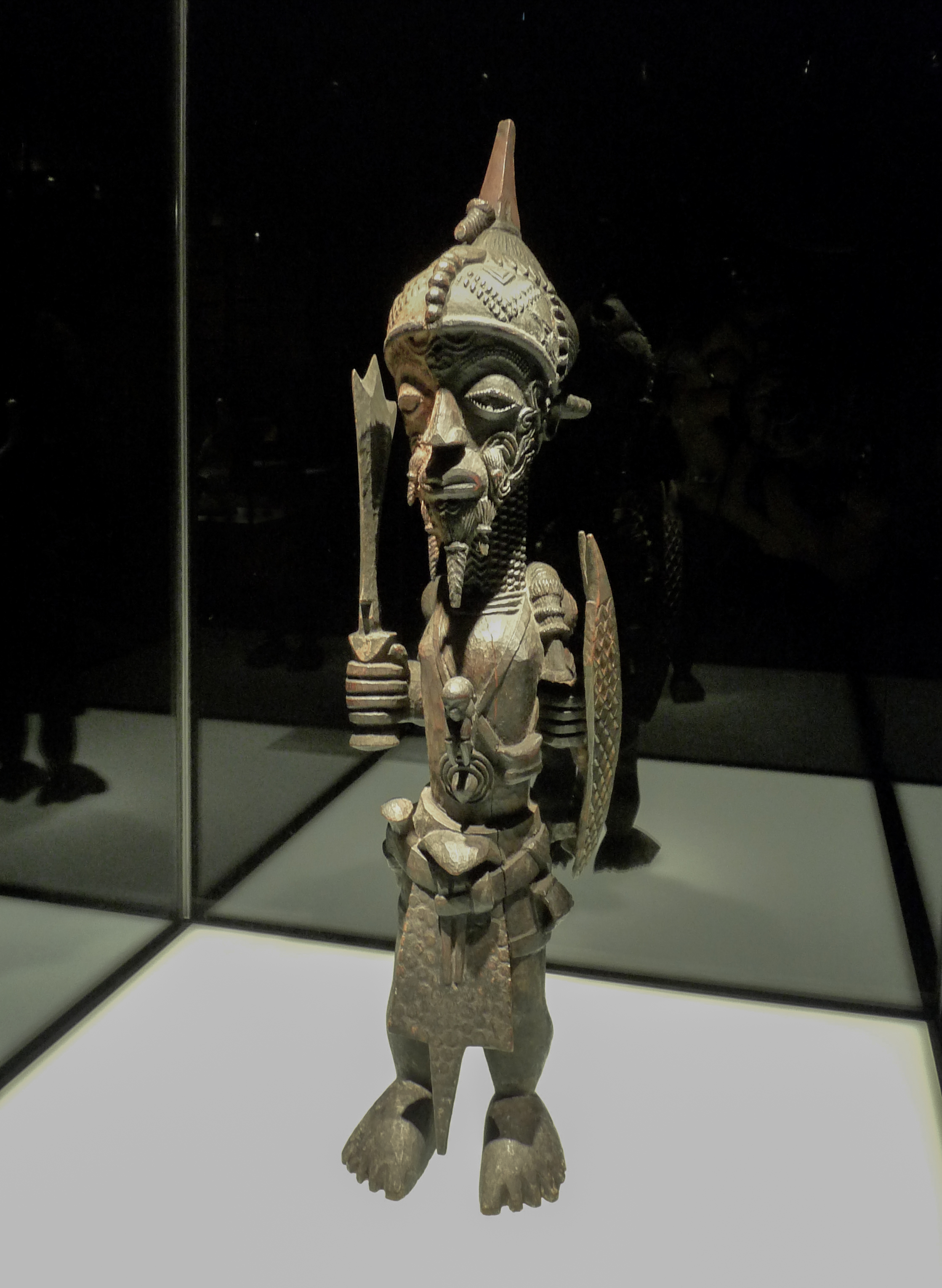 Statue masculine. Effigie de chef portant un pagne en peau de léopard (mukalenga wa nkashaama). République démocratique du Congo, Luluwa. Bois, pigment. H. 74 cm. 19e siècle, acquise sur le terrain, dans le village de Tshiweewe en 1885. Musée ethnologique de Berlin